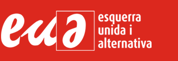 Logo der Esquerra Unida i Alternativa